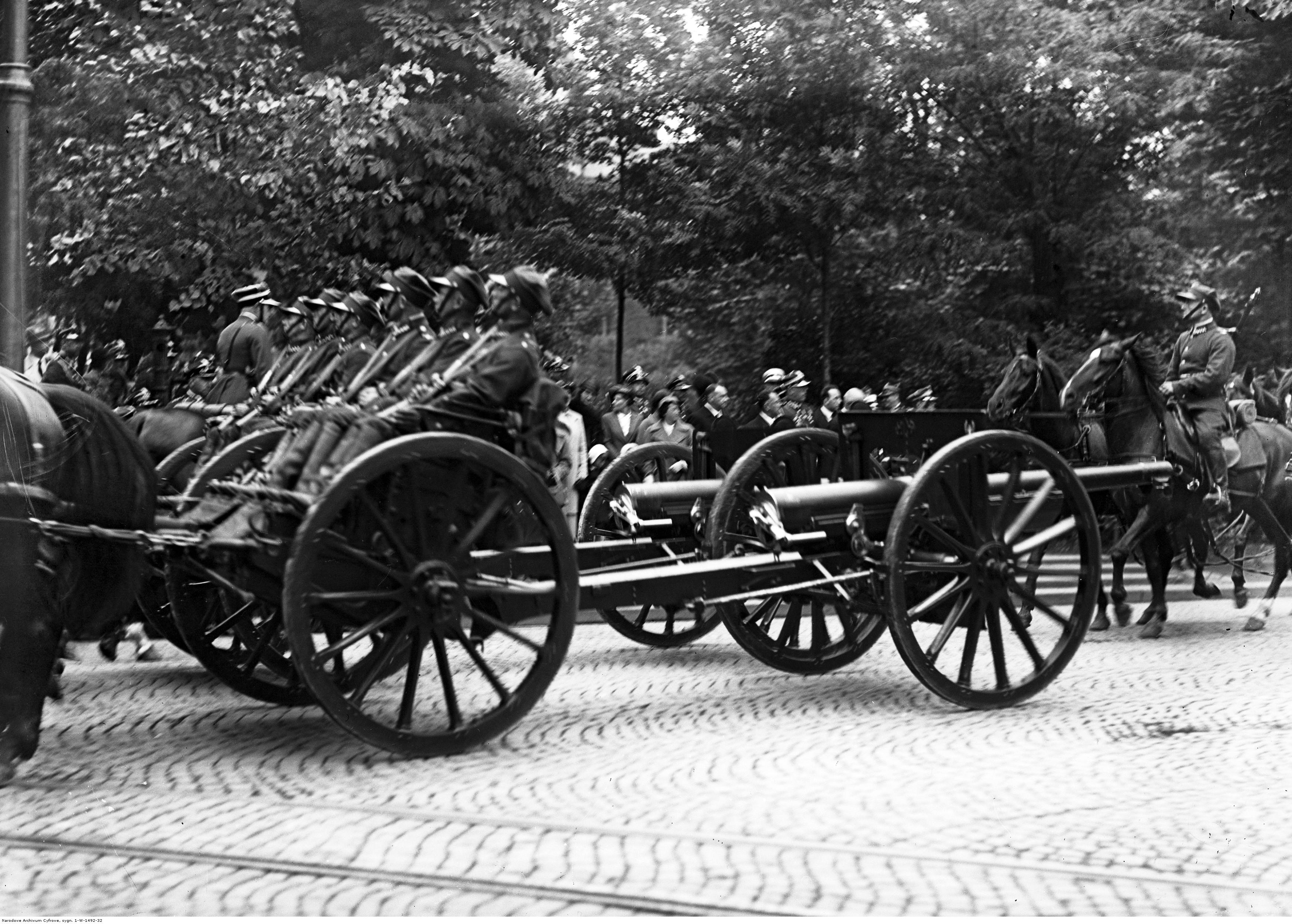 Piętnastolecie 6 Pułku Artylerii Lekkiej w Krakowie. Defilada baterii 75 mm armat polowych wz. 1897 Schneider w trakcji konnej 6 Pułku Artylerii Lekkiej; 1934 r. Koncern Ilustrowany Kurier Codzienny - Archiwum Ilustracji. Sygnatura: 1-W-1492-32